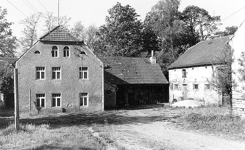 Original image description from the Deutsche Fotothek Schwepnitz-Zeisholz. Ehem. Neitschmühle, Ansicht